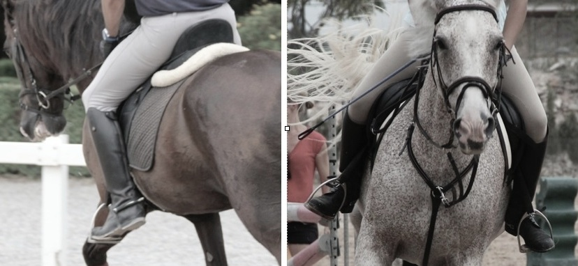 Comparativa posición pies en la doma clásica y el salto.